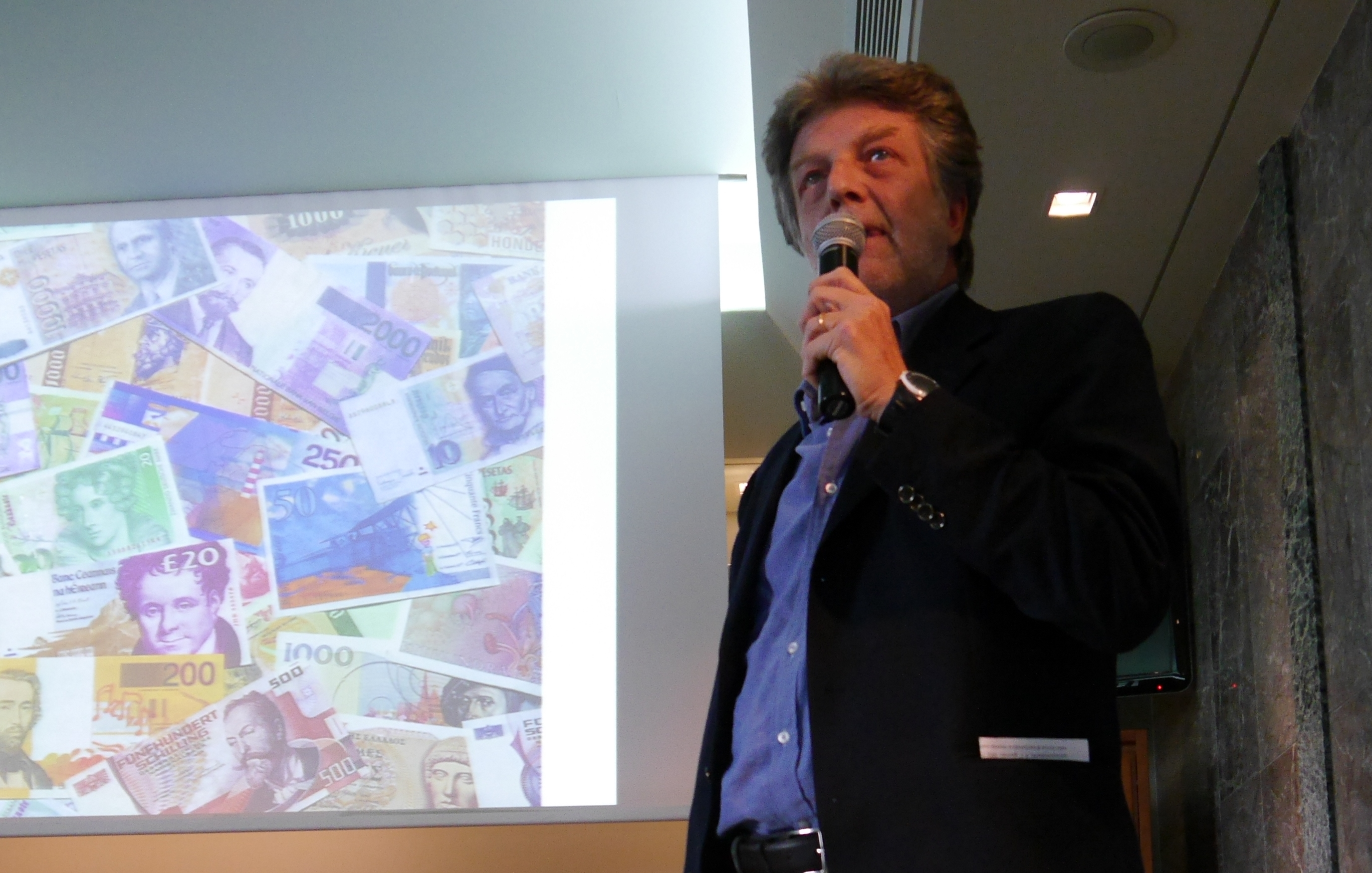 This photo was taken with Panasonic Lumix DMC-G6 camera, thanks to Panasonic.You can see all photographs in category: Taken with Panasonic Lumix DMC-G6.